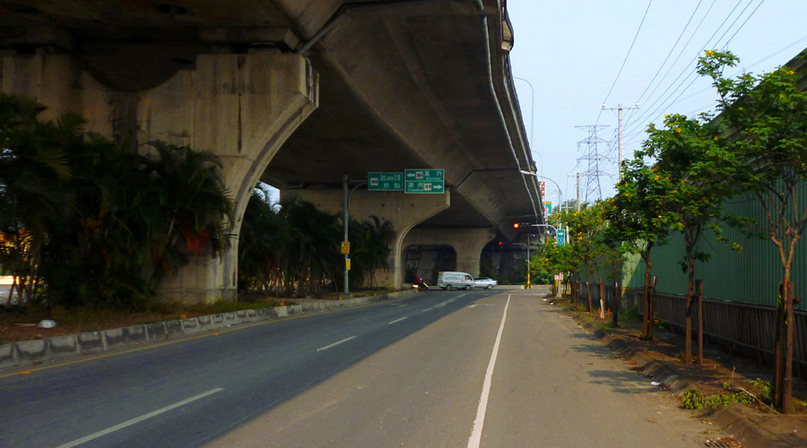 位於屏東縣竹田鄉的縣道188號終點